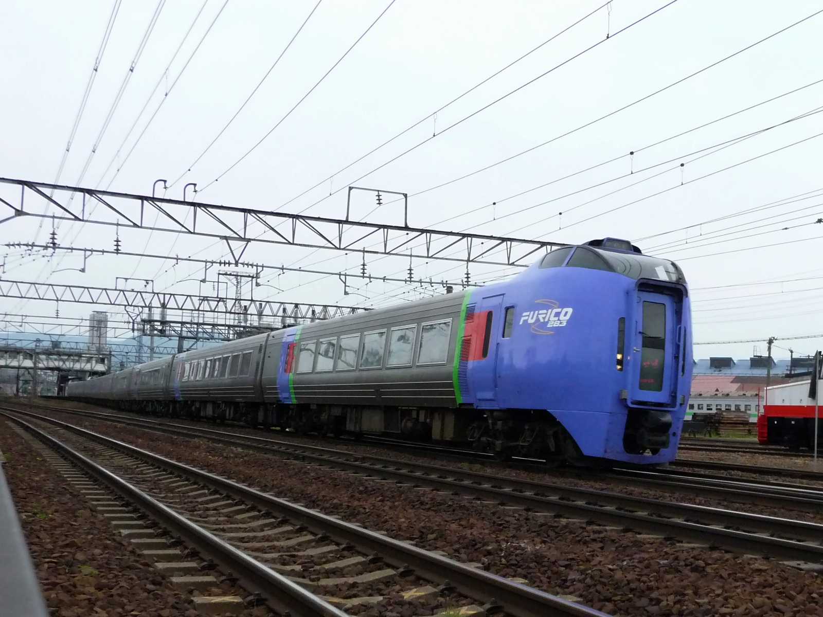 JR北海道苗穂駅を通過する。特急スーパーおおぞら9号